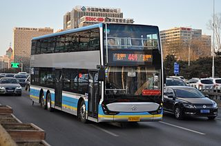 广通纯电动公交